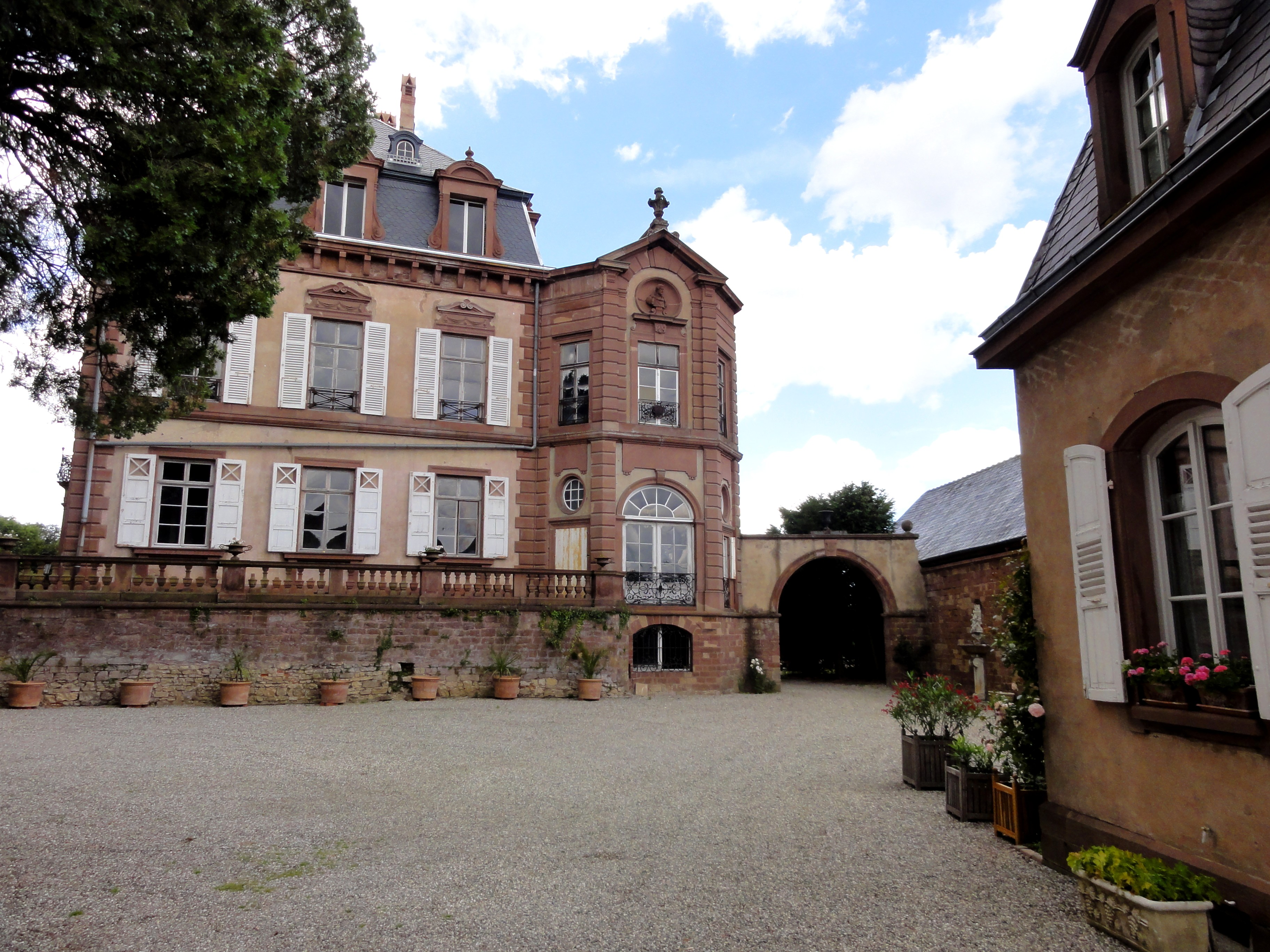 Alsace, Bas-Rhin, Château de Froeschwiller (PA67000074, IA67008477).